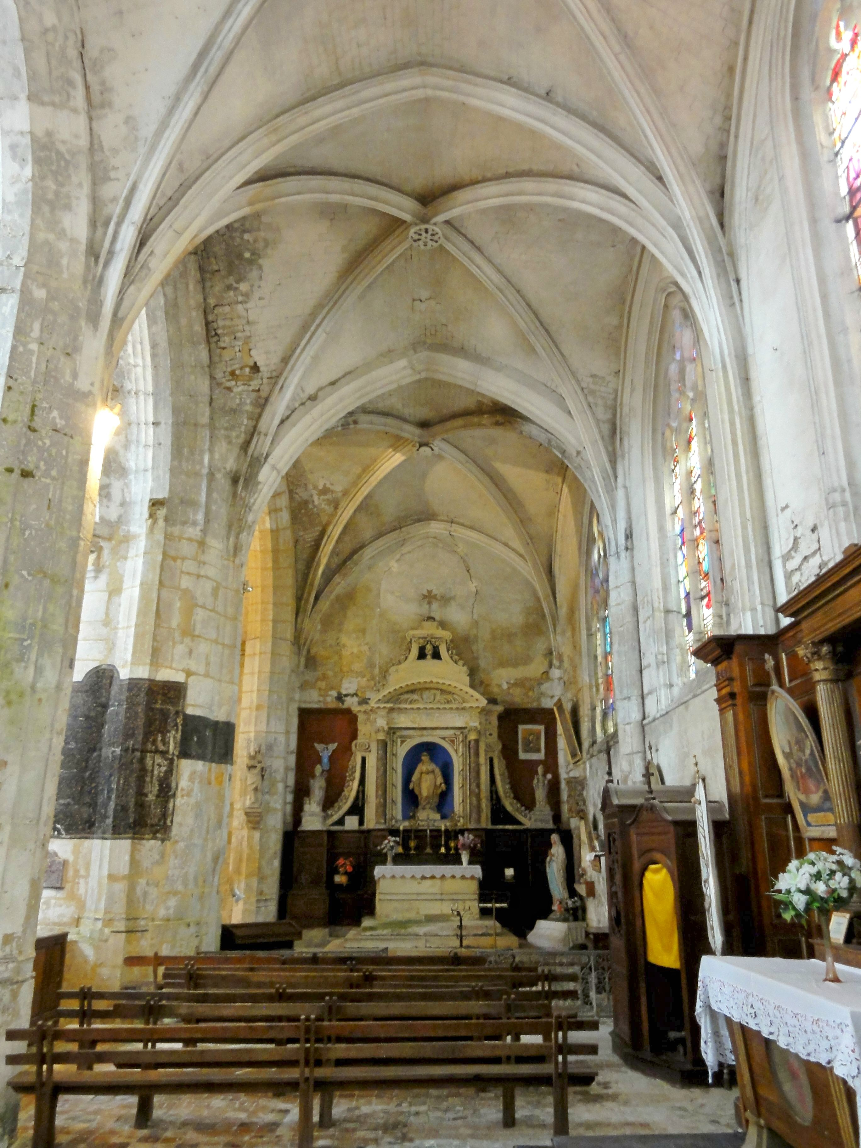 Collatéral sud, vue vers l'est.